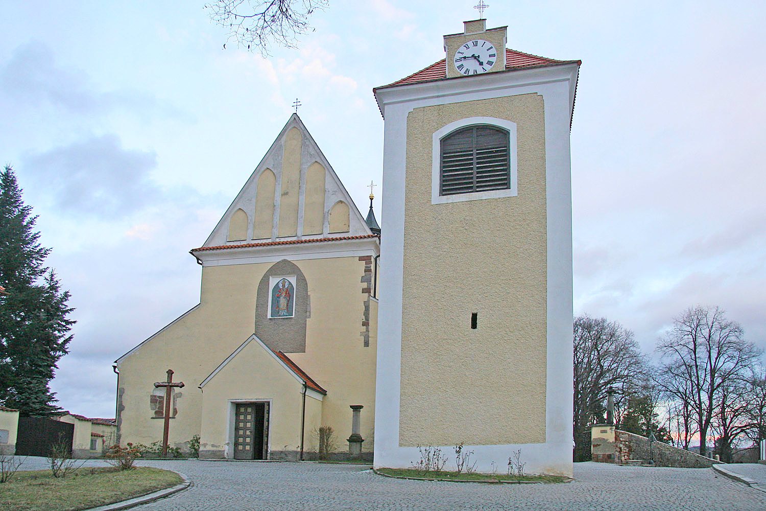 Kostel svatého Mikuláše se zvonicí na Karlově v Benešově